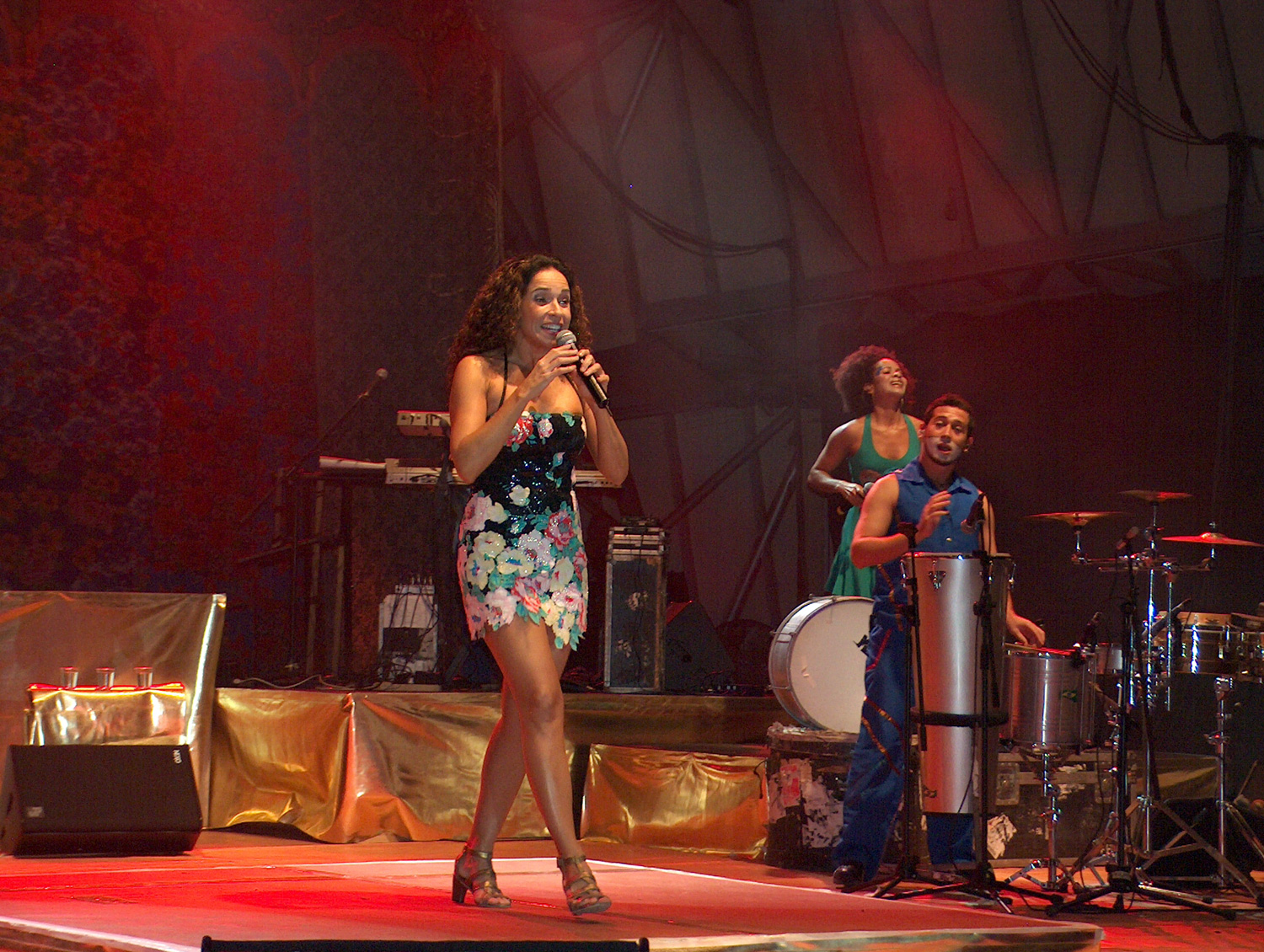 דניאלה מרקורי בישראל 2007